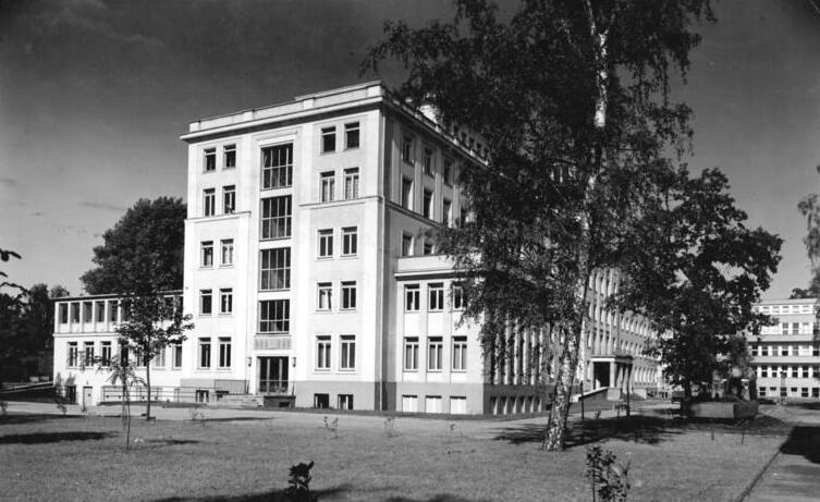 Dresden, Medizinische Akademie, Chirurgische Klinik 4.9.1959 Wiederaufbau der Stadt Dresden UBz: Medizinische Akademie "Carl Gustav Carus", Dresden-Johannstadt - Chirurgische Klinik (Im Hintergrund wiederaufgebaute Kinderklinik) Die Krankenhäuser der Stadt Dresden wurden zum größten Teil 1945 zerstört, diese sind wiederaufgebaut und durch zahlreiche Neubauten erweitert worden. Reproduktion jeder Art nur mit Genehmigung und Angabe des Urhebers gestattet Rat der Stadt Dresden Der Chefarchitekt Bildstelle